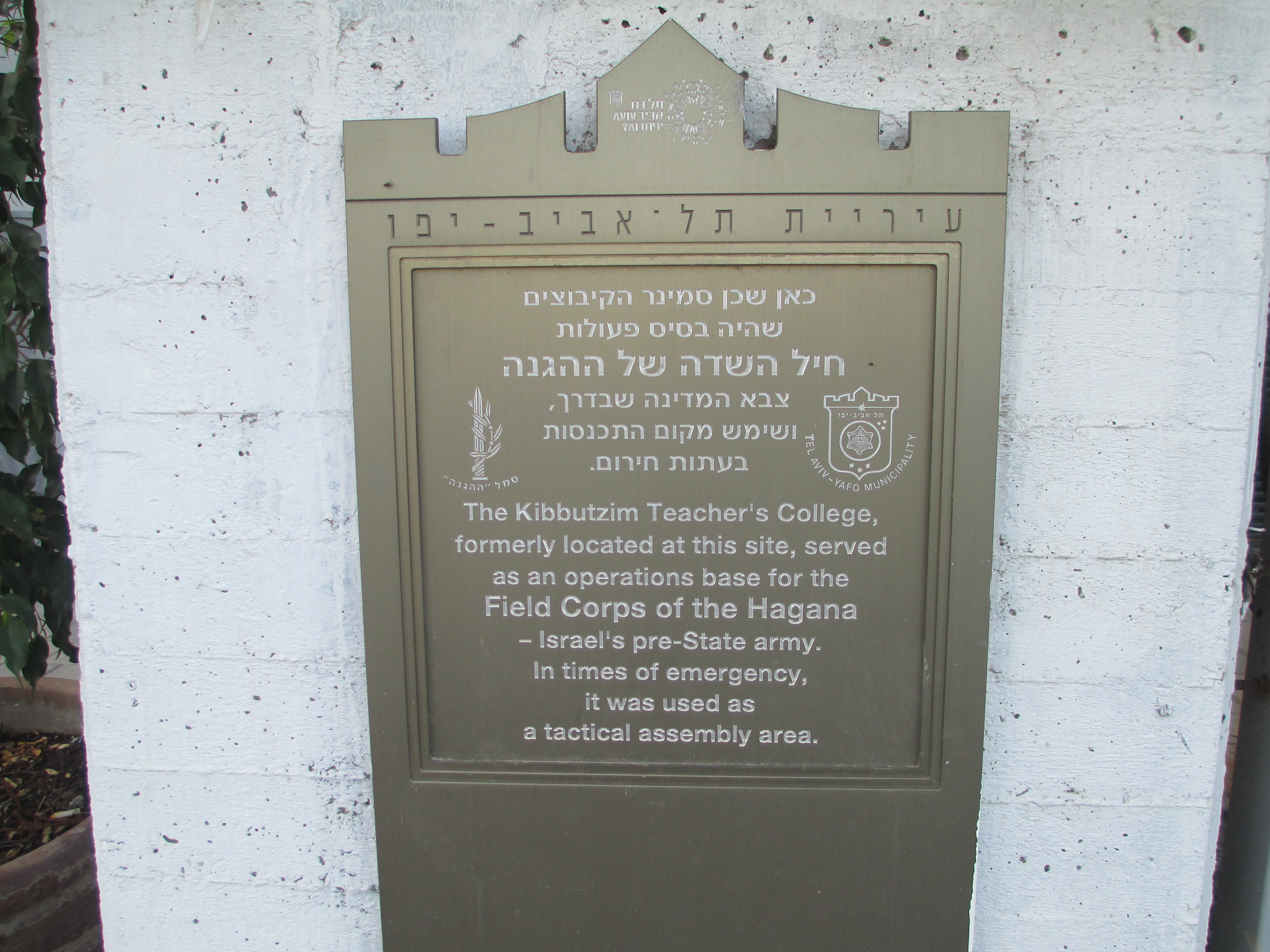 לוחית זיכרון בכניסה לסמינר הקיבוצים במקומו הקודם, רח' בני דן 36